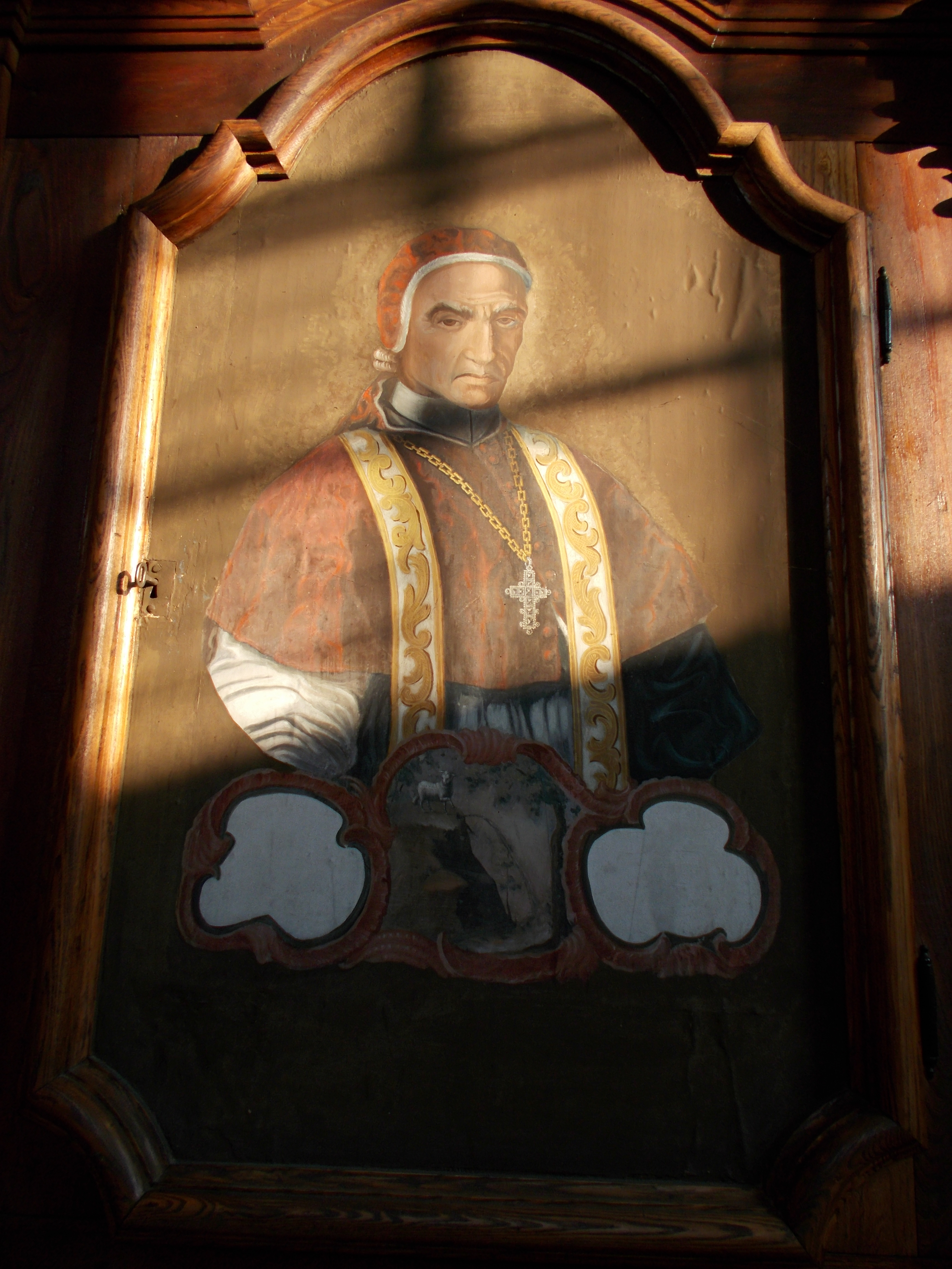 Zdjęcie portretu papieża Grzegorza XVI z Bieniszewa